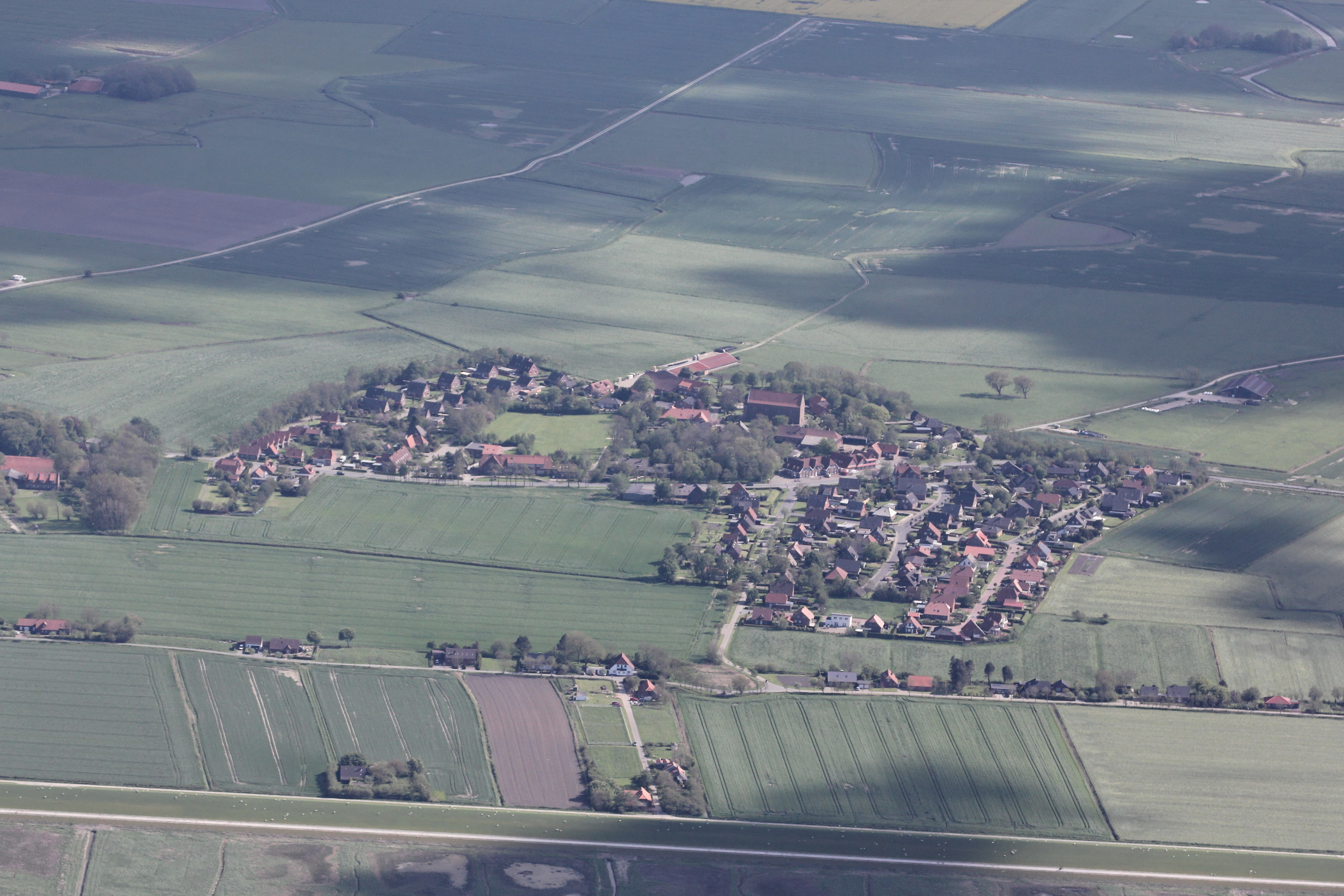 Luftbild von Minsen